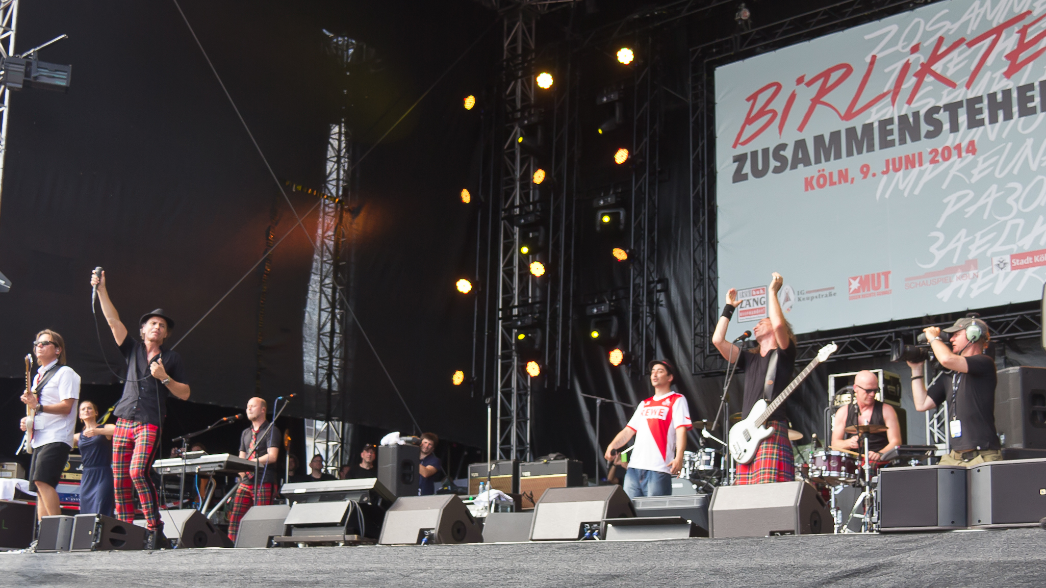 Birlikte - Kundgebung - Brings und Eko Fresh